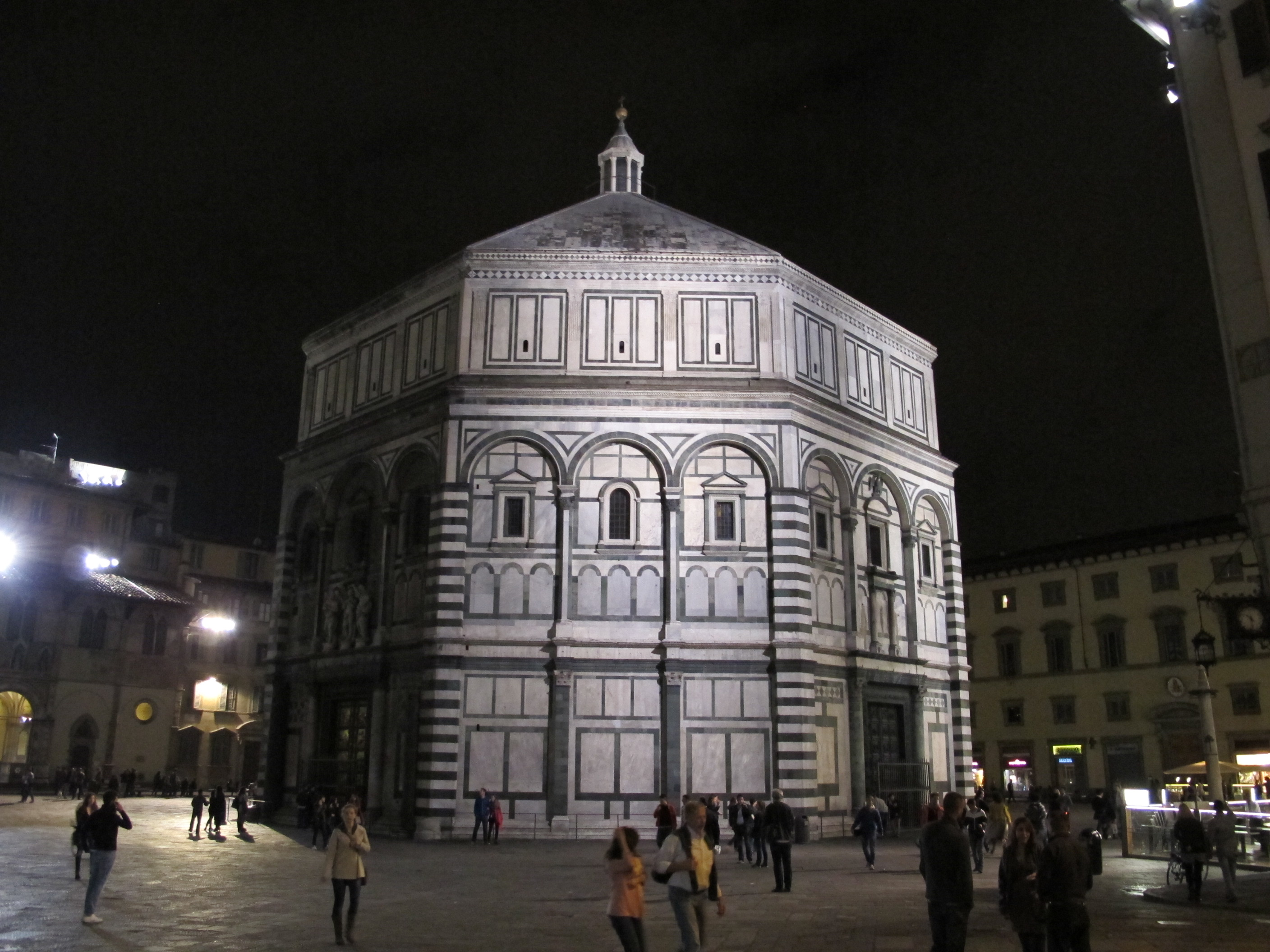 Battistero di firenze, veduta di notte